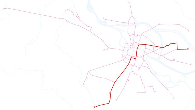 Poglądowa mapka przebiegu linii tramwajowej 17 we Wrocławiu.